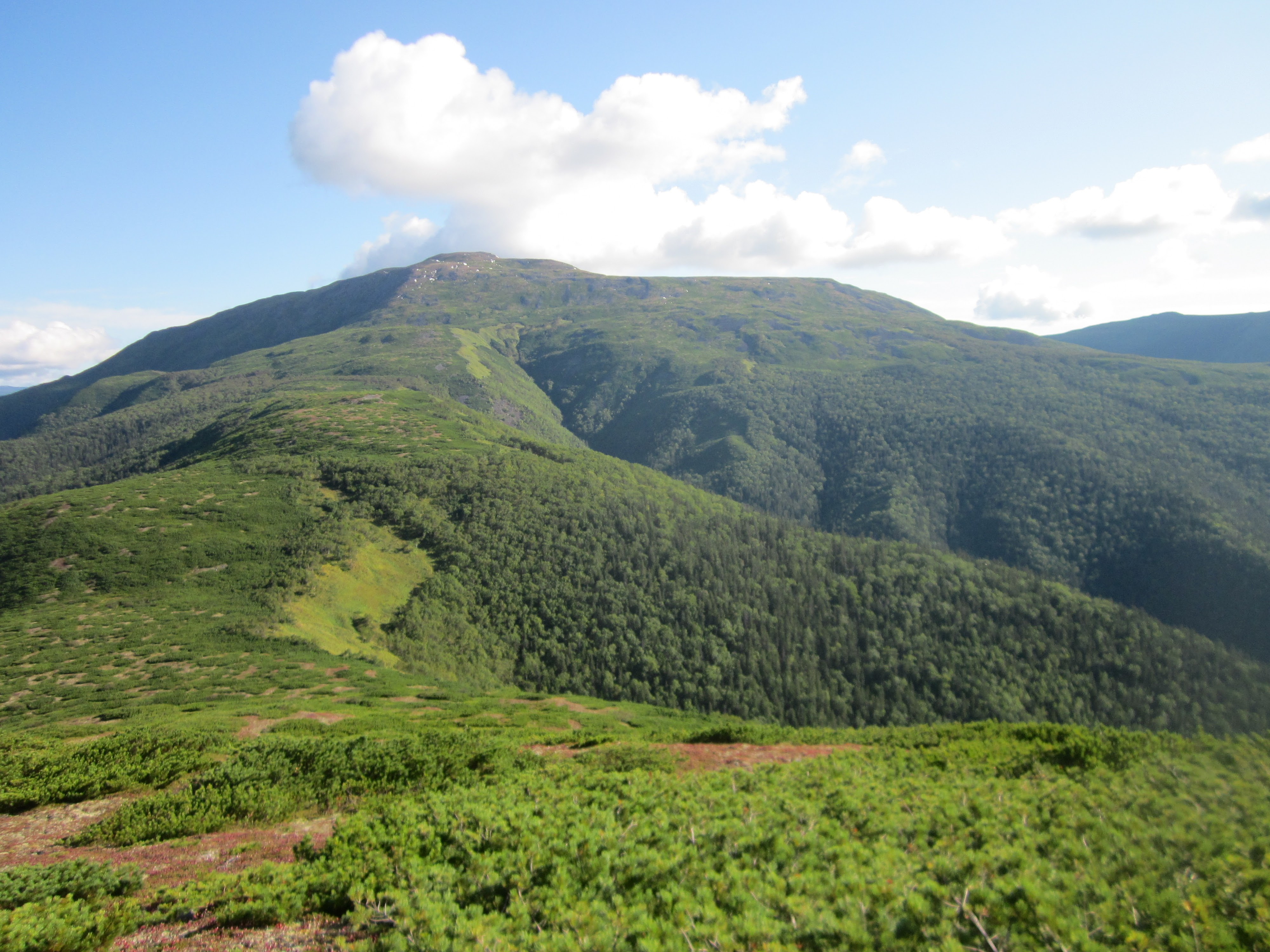 г. Аник (1933 м), вид с г. Таборная